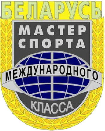 Знак к спортивному званию «Мастер спорта Республики Беларусь международного класса» (с 2014 года)